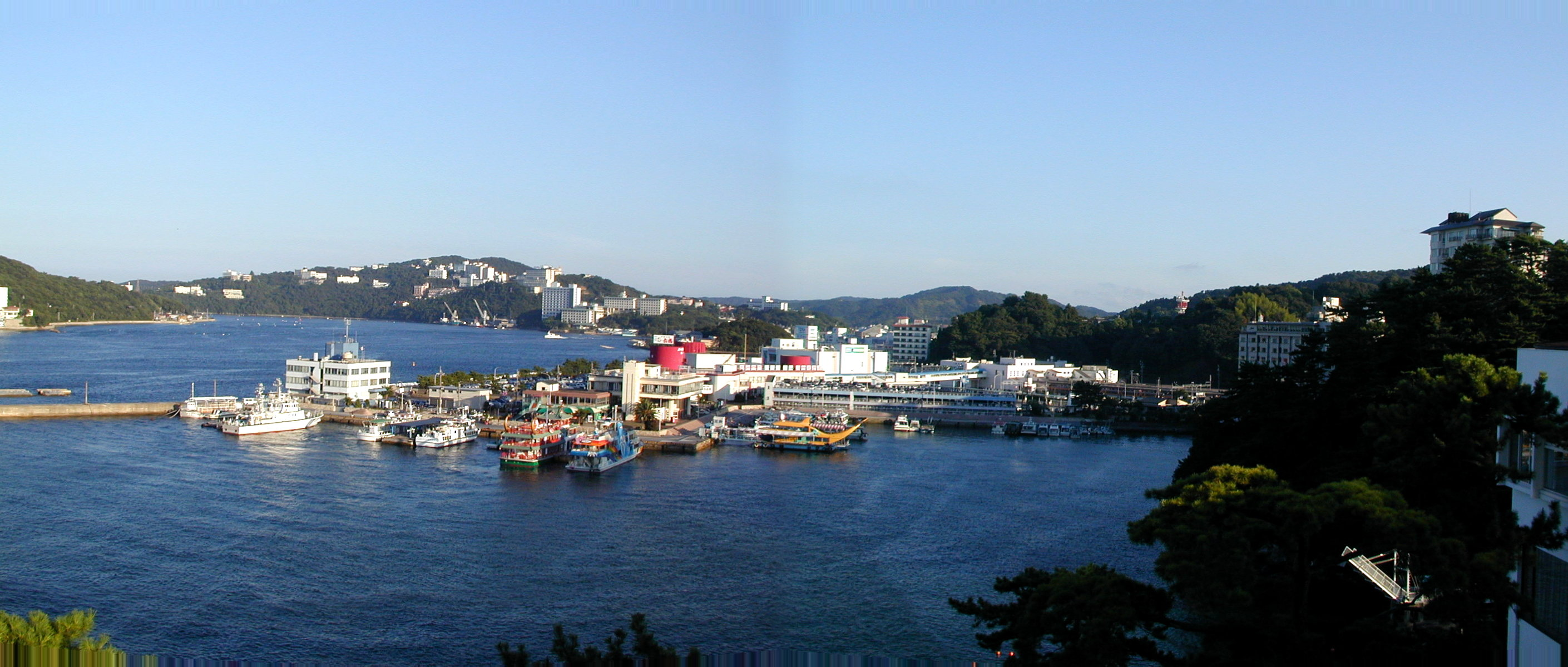 Baia di Toba panorama. In questa baia fu sperimentata per la prima volta da Kokichi Mikimoto la coltivazione delle perle.